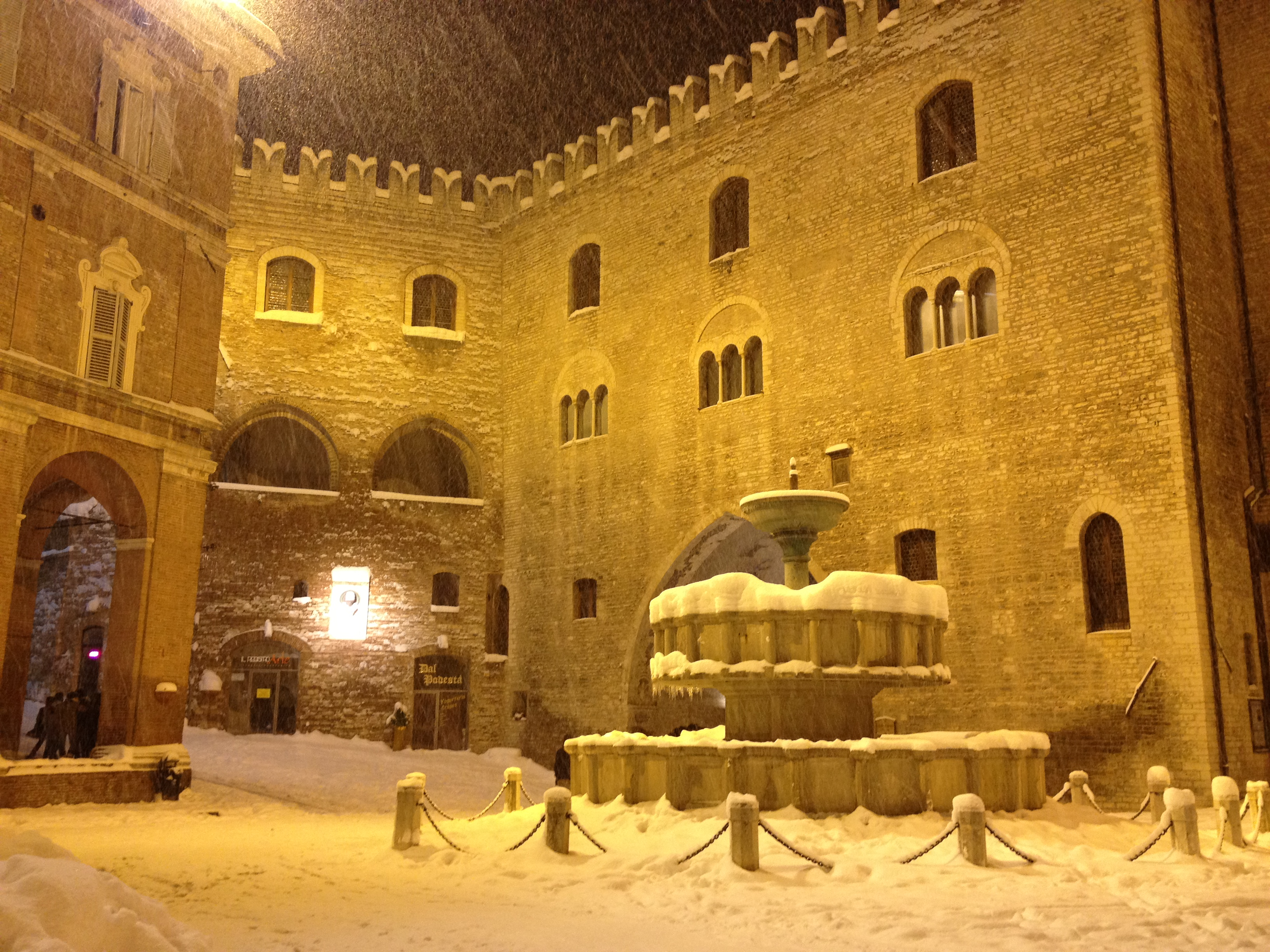 Palazzo del Podestà e Fontana Sturinalto